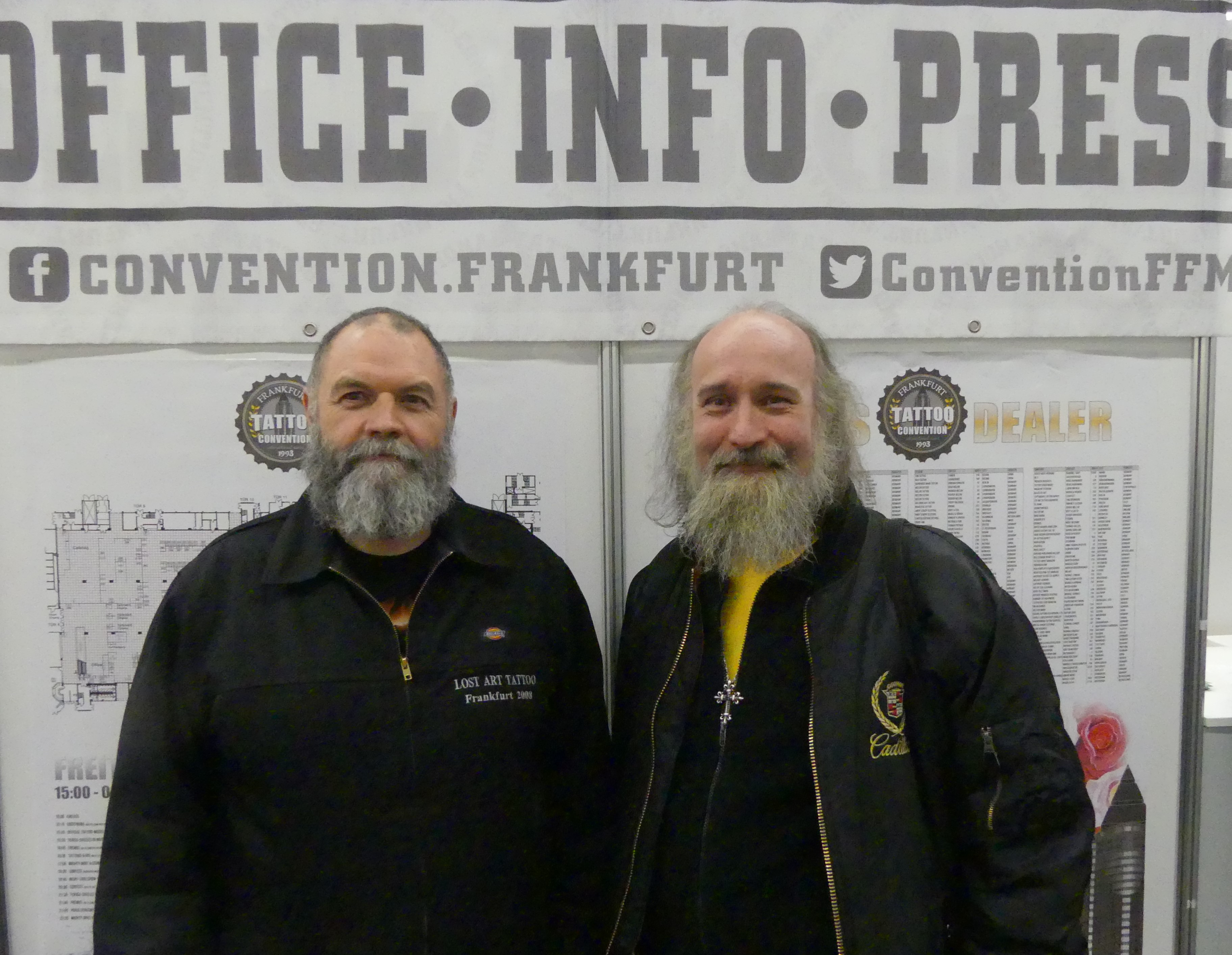 Die Gründungsmitglieder des DOT Thommy Köhler + Herry Nentwig auf der Tattoo Convention Frankfurt/Main im April 2019. Köhler ist seit 1993 Veranstalter der Convention.